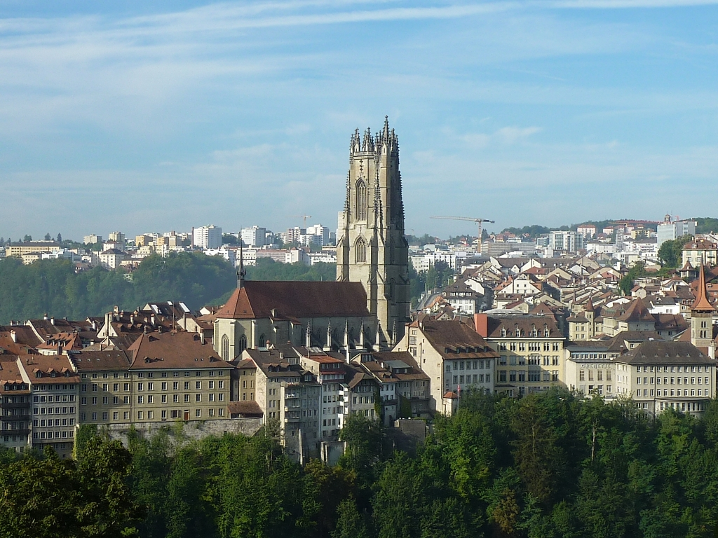 Cathédrale St-Nicolas de Fribourg (Suisse). Vue générale depuis le Schönberg.